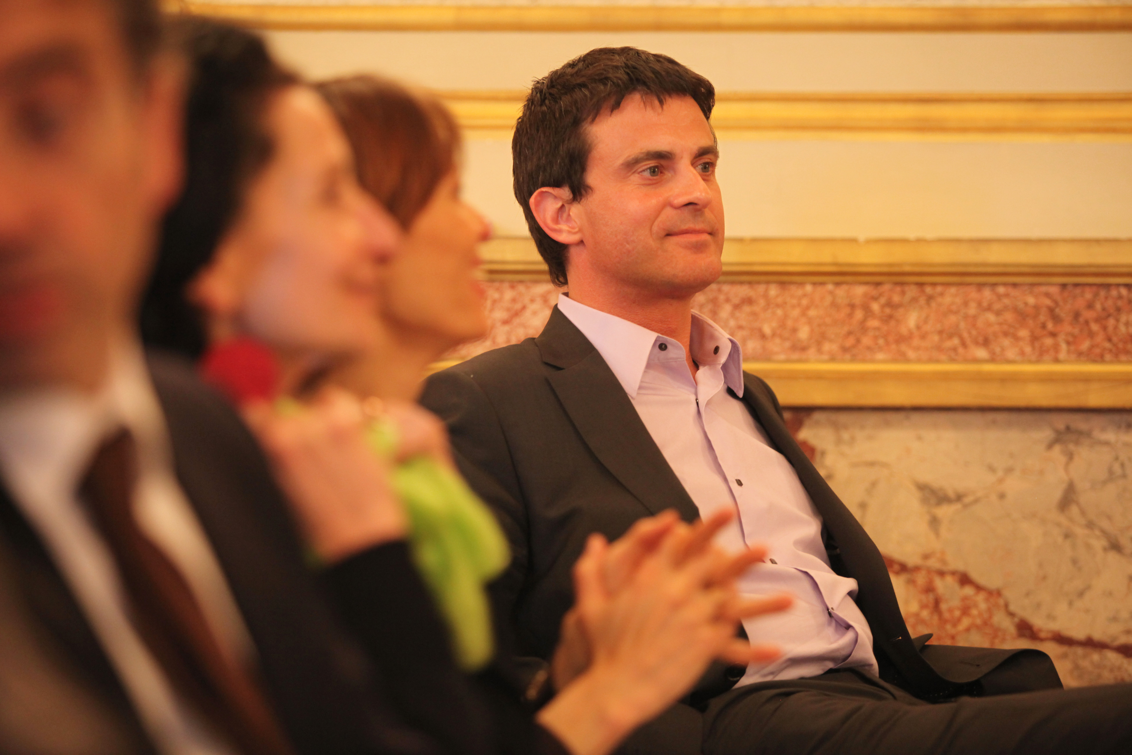 Manuel Valls à la Journée du livre politique, en avril 2009.